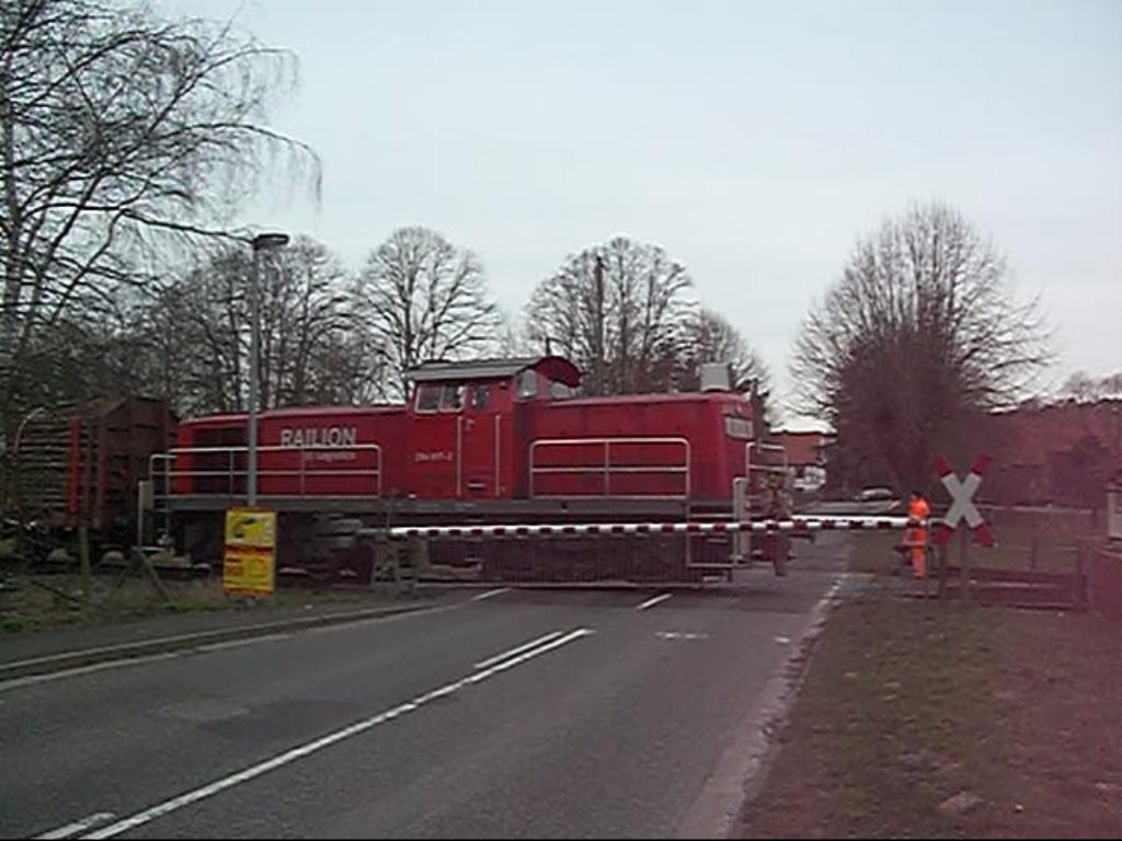 Güterzug auf dem manuellen Bahnübergang Niederaula (Bild aus Videoclip)